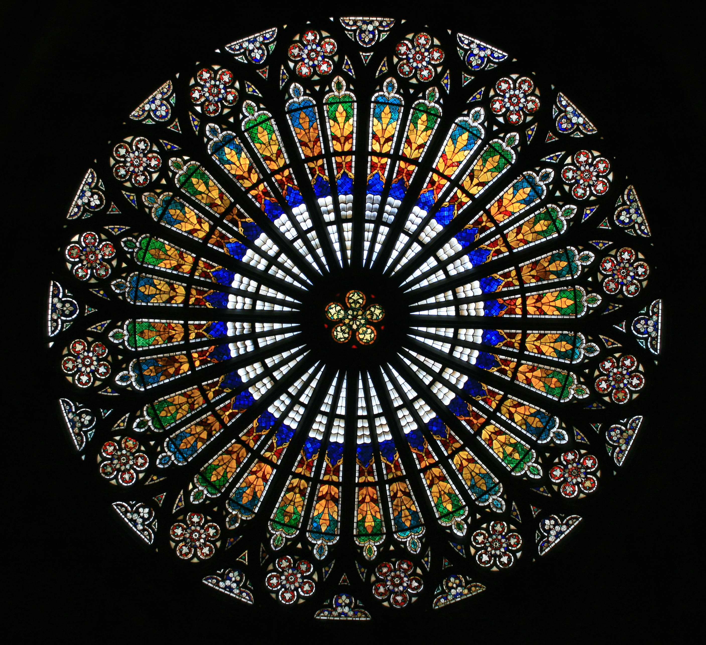 Rosace de la cathédrale de Strasbourg